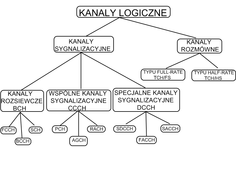 Podział kanałów logicznych wykorzystywanych w systemi GSM